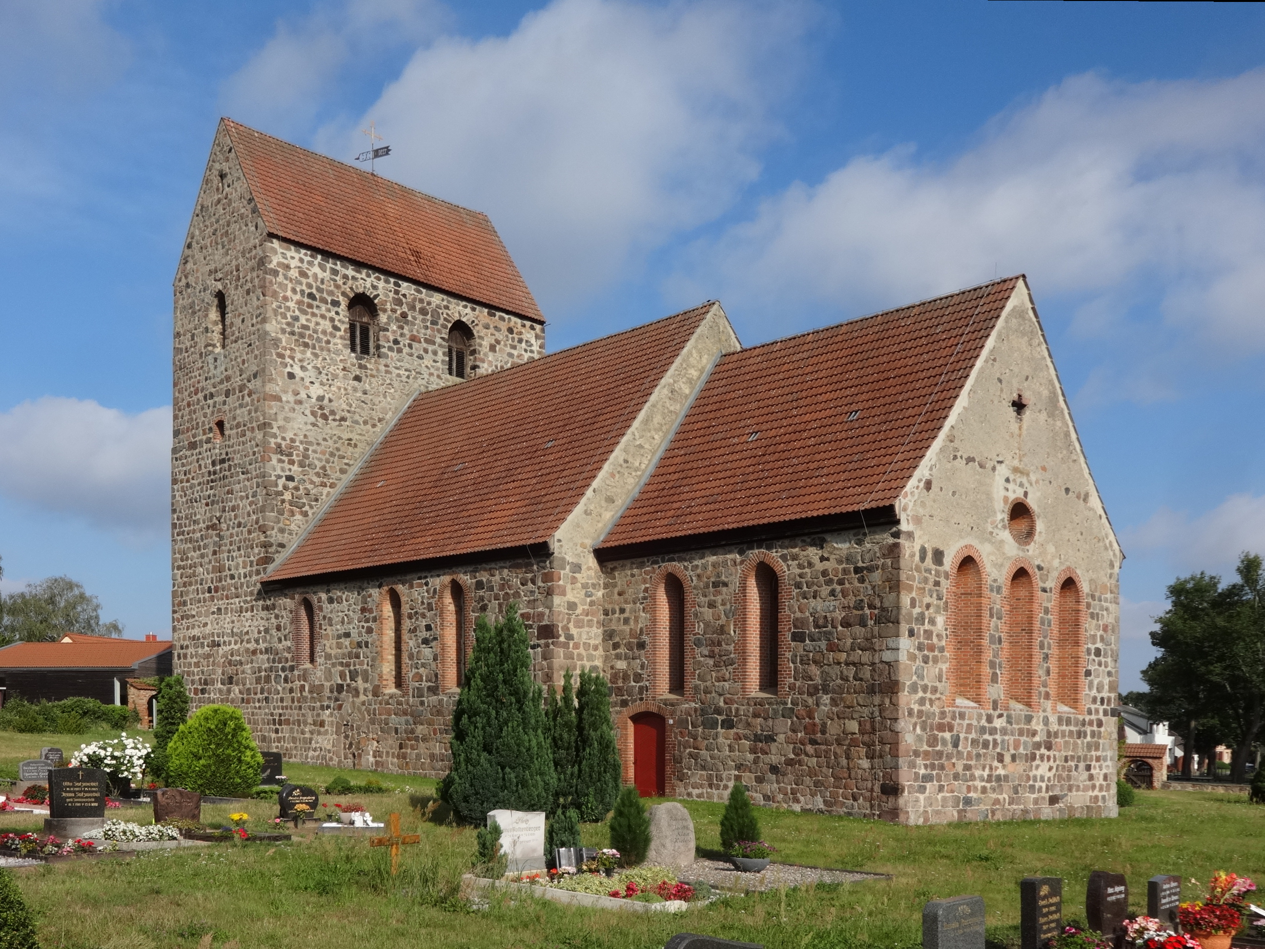 Die Dorfkirche in Gutengermendorf entstand in der Mitte des 13. Jahrhunderts aus Feldsteinen. 1899 wurde sie barock überformt. In ihrem Innern befindet sich unter anderem eine hölzerne Kanzel aus dem Jahr 1697.